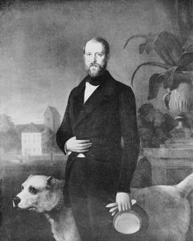 Moritz Berendt: Otto von Bisrmarck als Mitglied des Vereiingten Landtags, 1854 von märkischen Gutsbesitzern der Stadt Brandenburg gestiftet, hing im Rathaus Brandenburg, mit dem Rathaus im 2. Weltkrieg zerstört